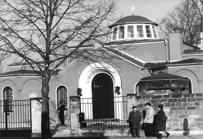 Dresden, Synagoge ADN-ZB Häßler 5.11.1988 Dresden: Die Synagoge der Jüdischen Gemeinde in Dresden wurde wieder geweiht. Aus diesem Anlaß fand ein Gottesdienst statt.